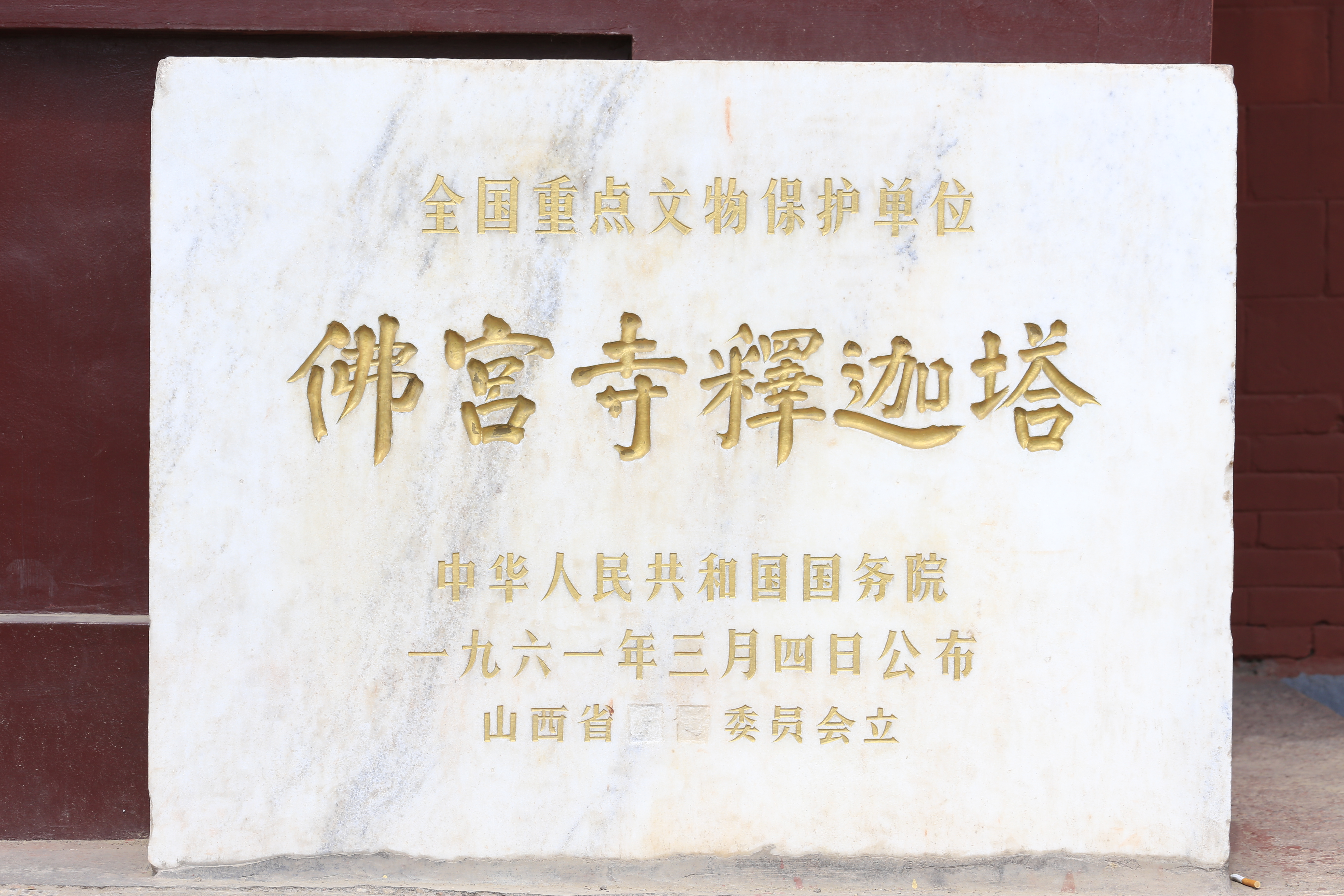 应县佛宫寺释迦塔